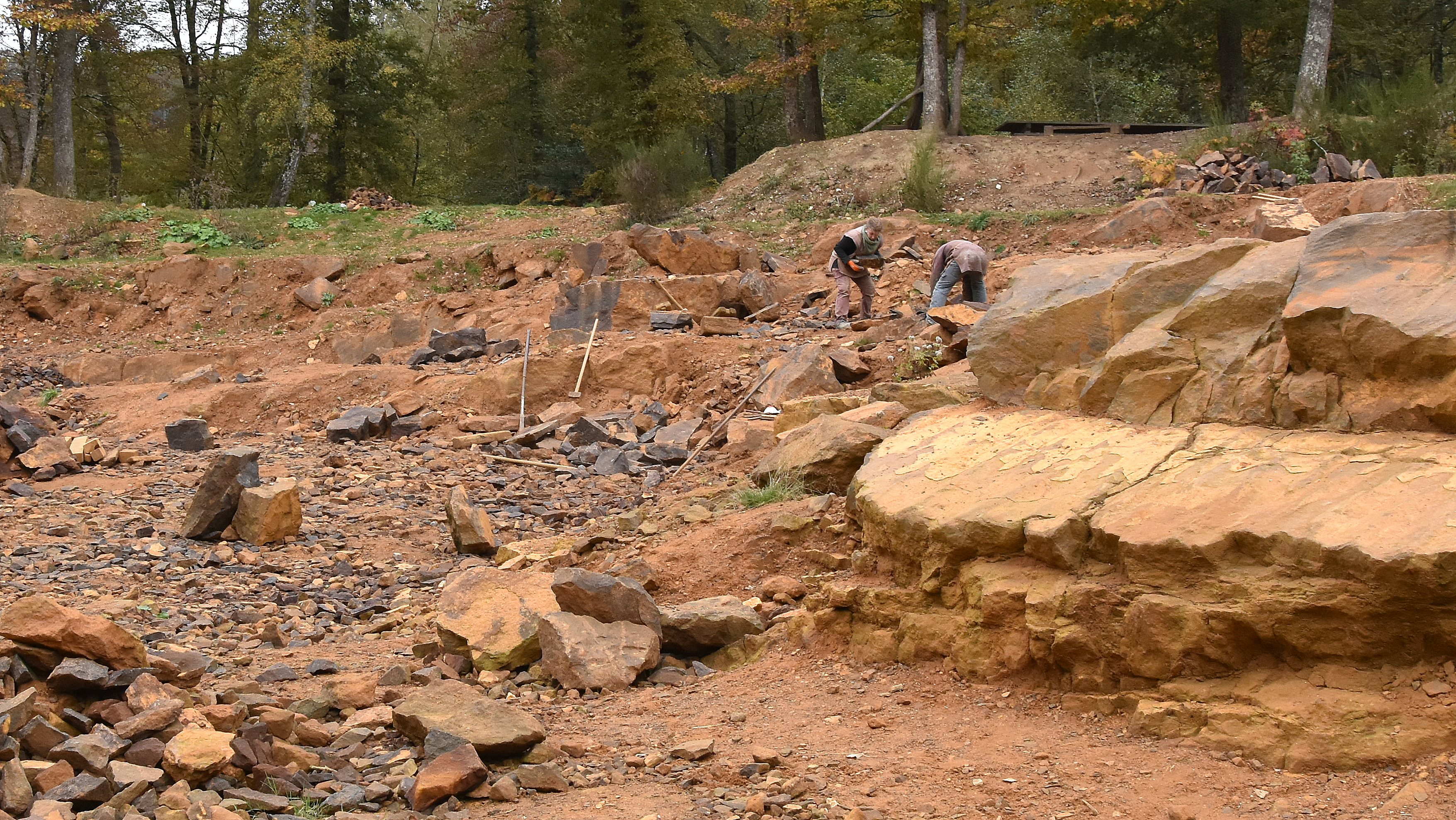 De groeve aan de noordzijde van het kasteel van Guédelon, Frankrijk